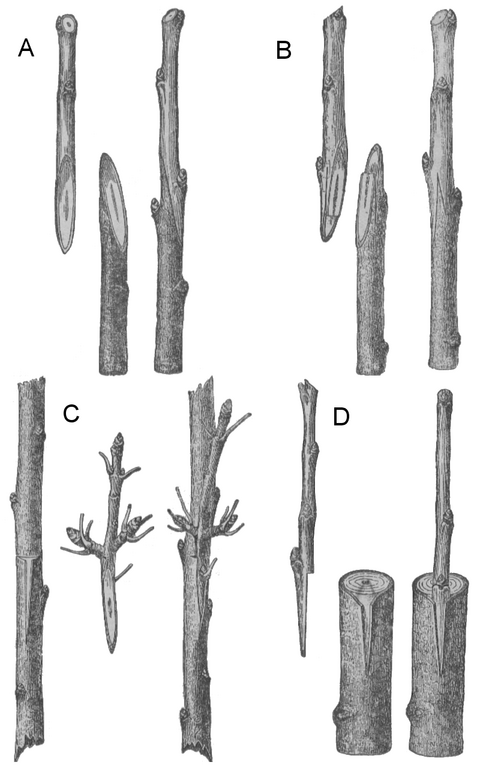 Zrazy - ogrodnictwo